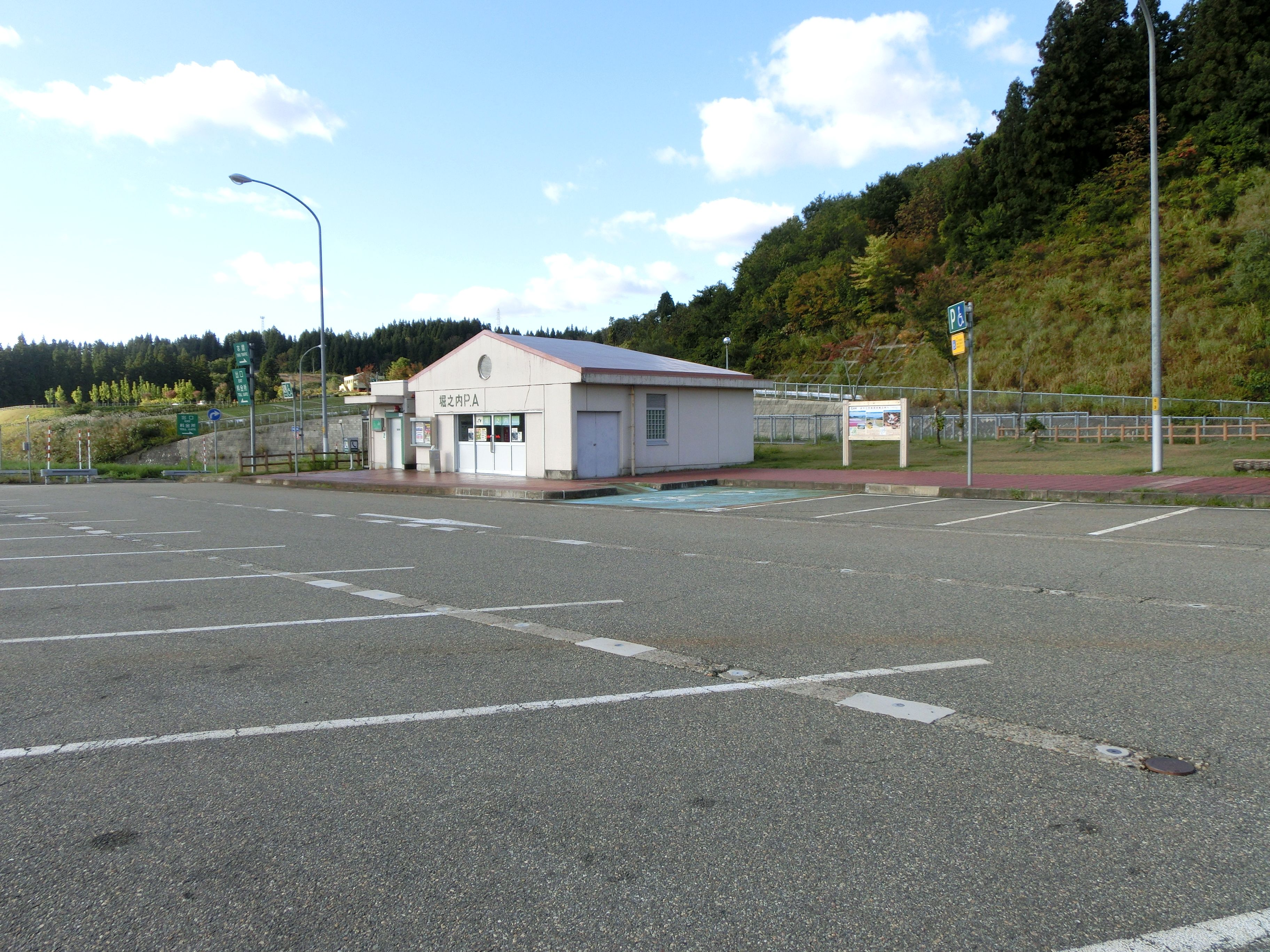 関越自動車道 堀之内パーキングエリア（上り線）